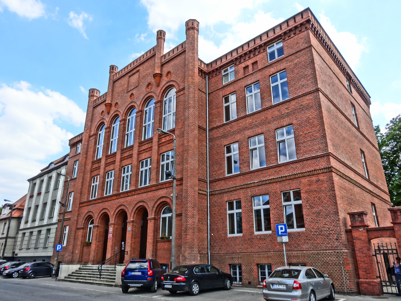 Budynek Seminarium Duchownego w Bydgoszczy, 1858 r.